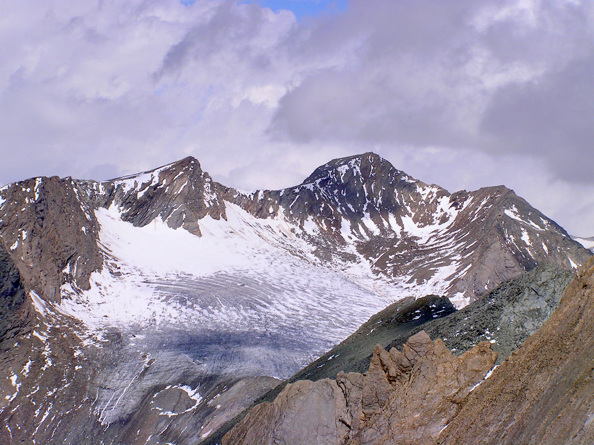 Der Große Muntanitz von der Vorderen Kendlspitze aus gesehen